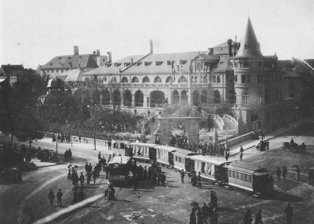 München, Löwenbräukeller am Stiglmaierplatz